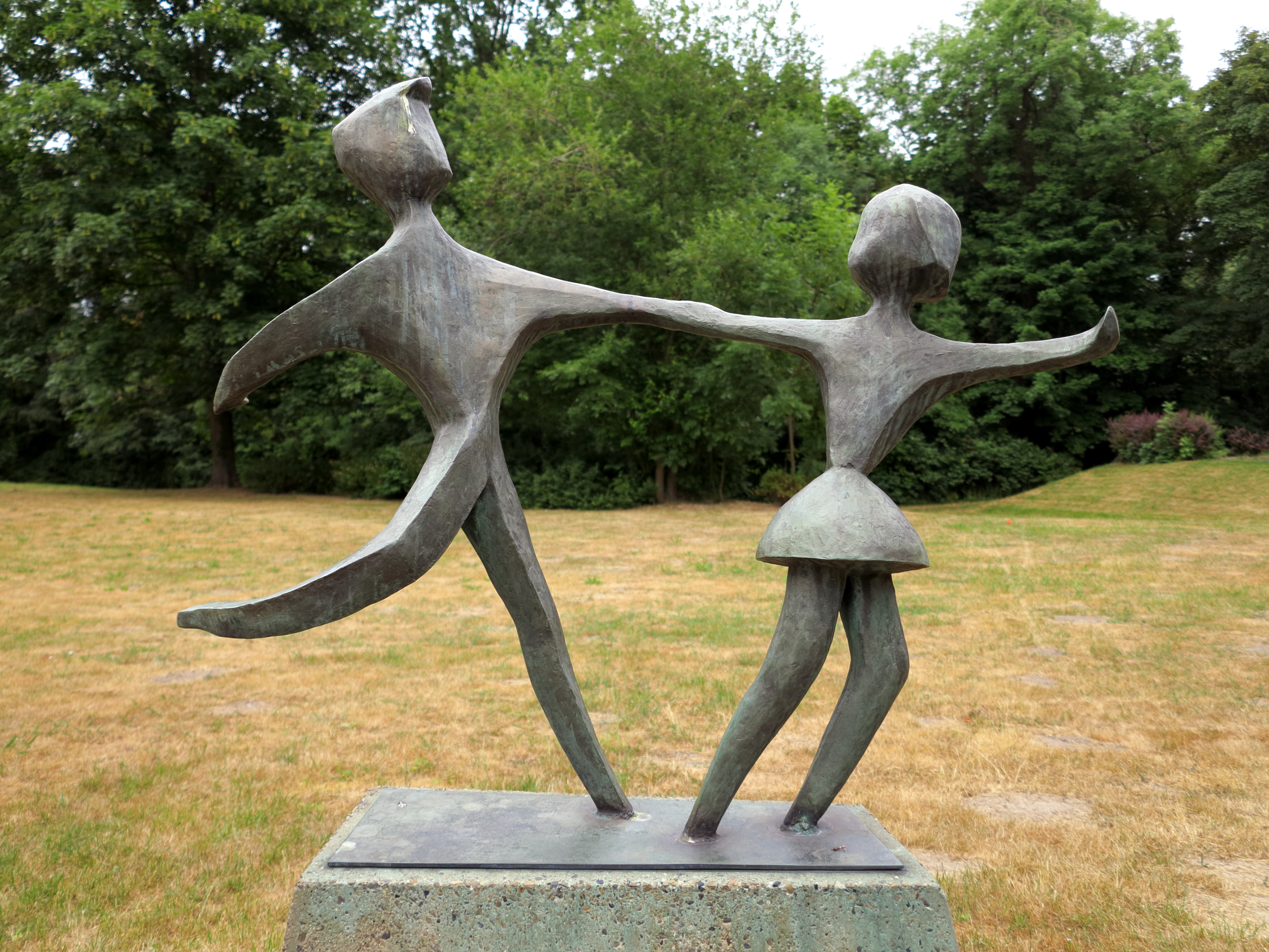 Braunschweig: eine Bronze-Plastik zweier tanzender Kinder im Park des Klinikums Holwedestraße von Knud Knudsen